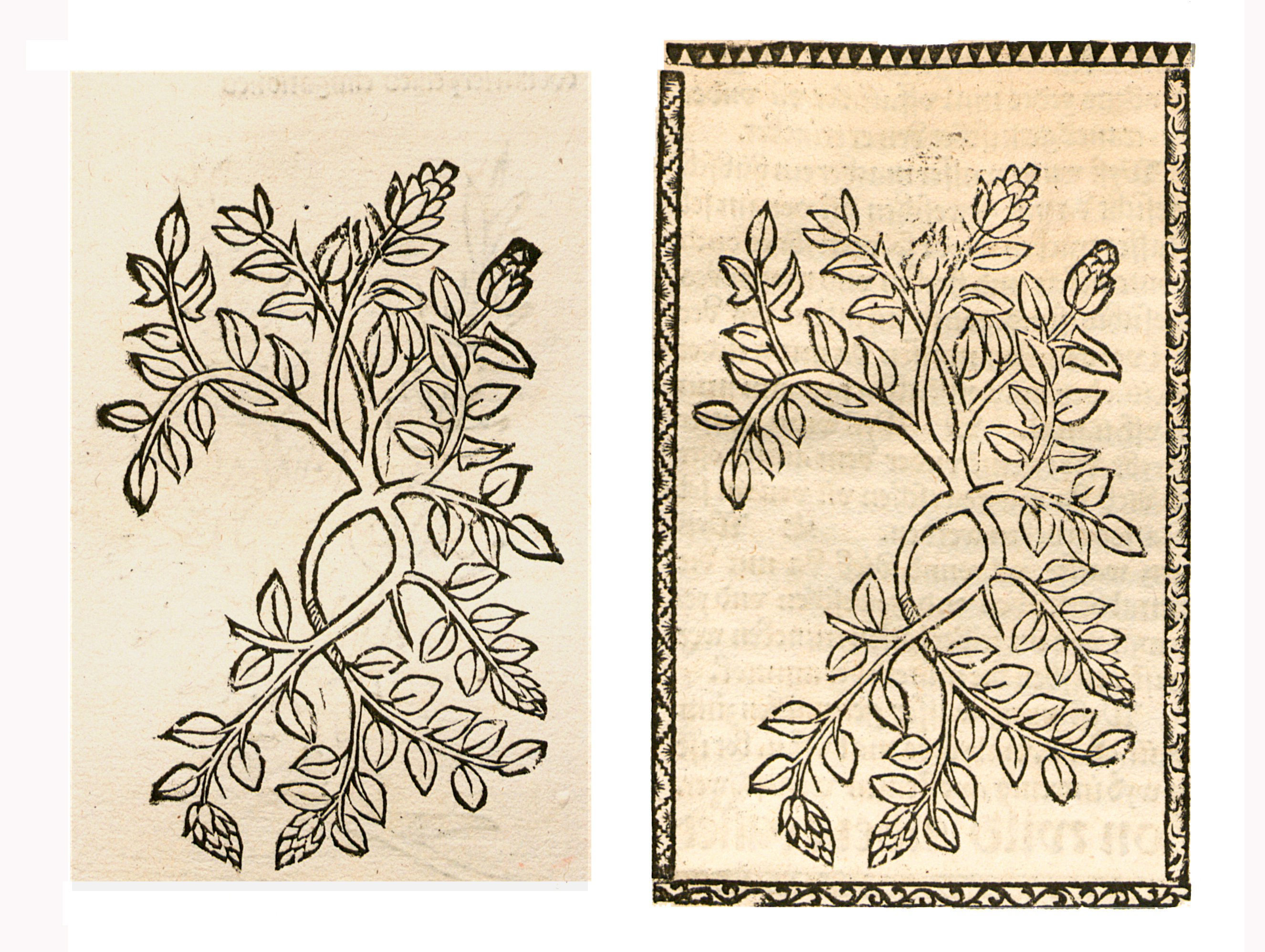 Abbildung von: Weg Gras (Polygonum aviculare)